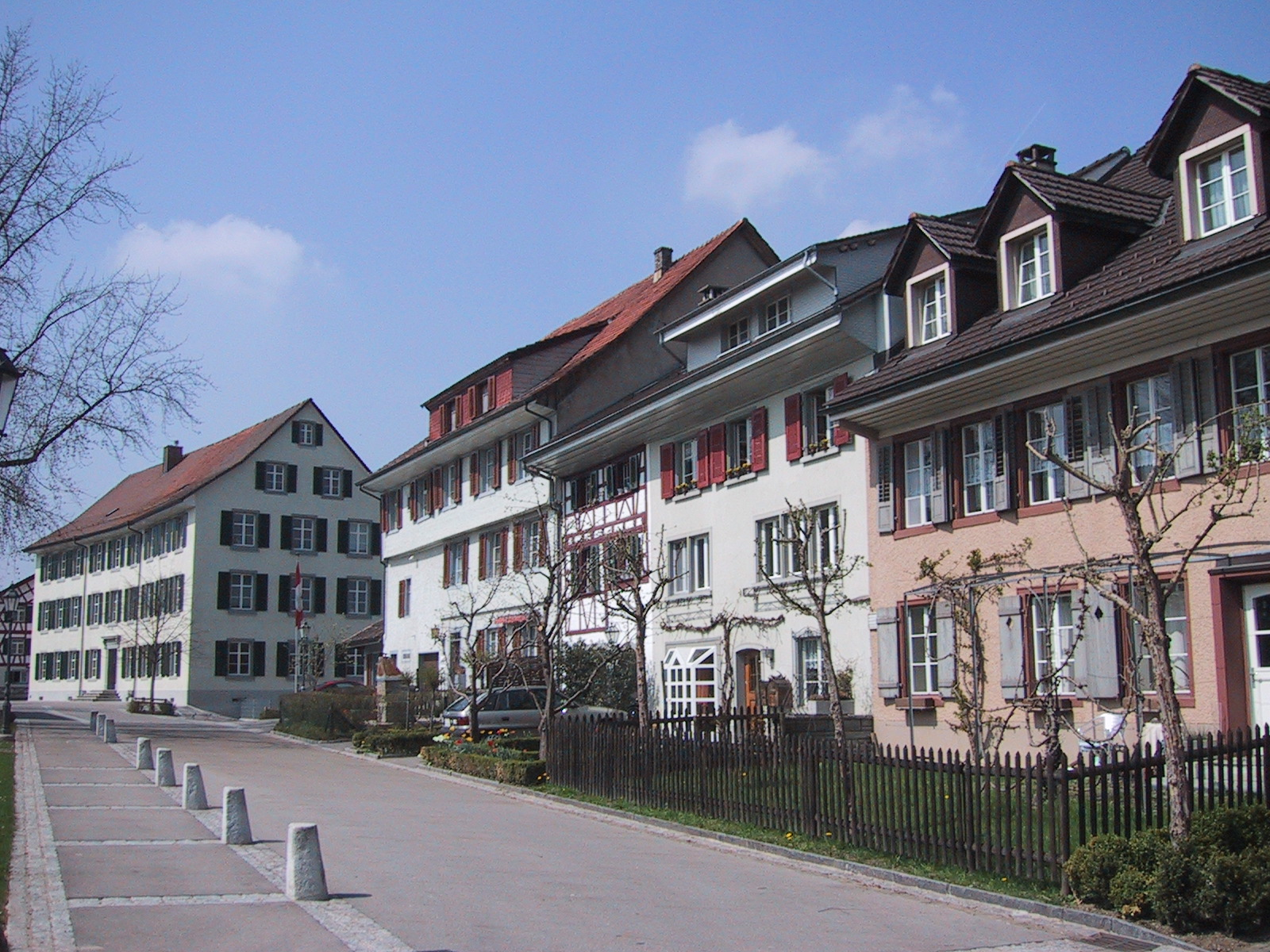 Aufnahme einer Häuserzeile vor der Kirche in Pfyn TG.